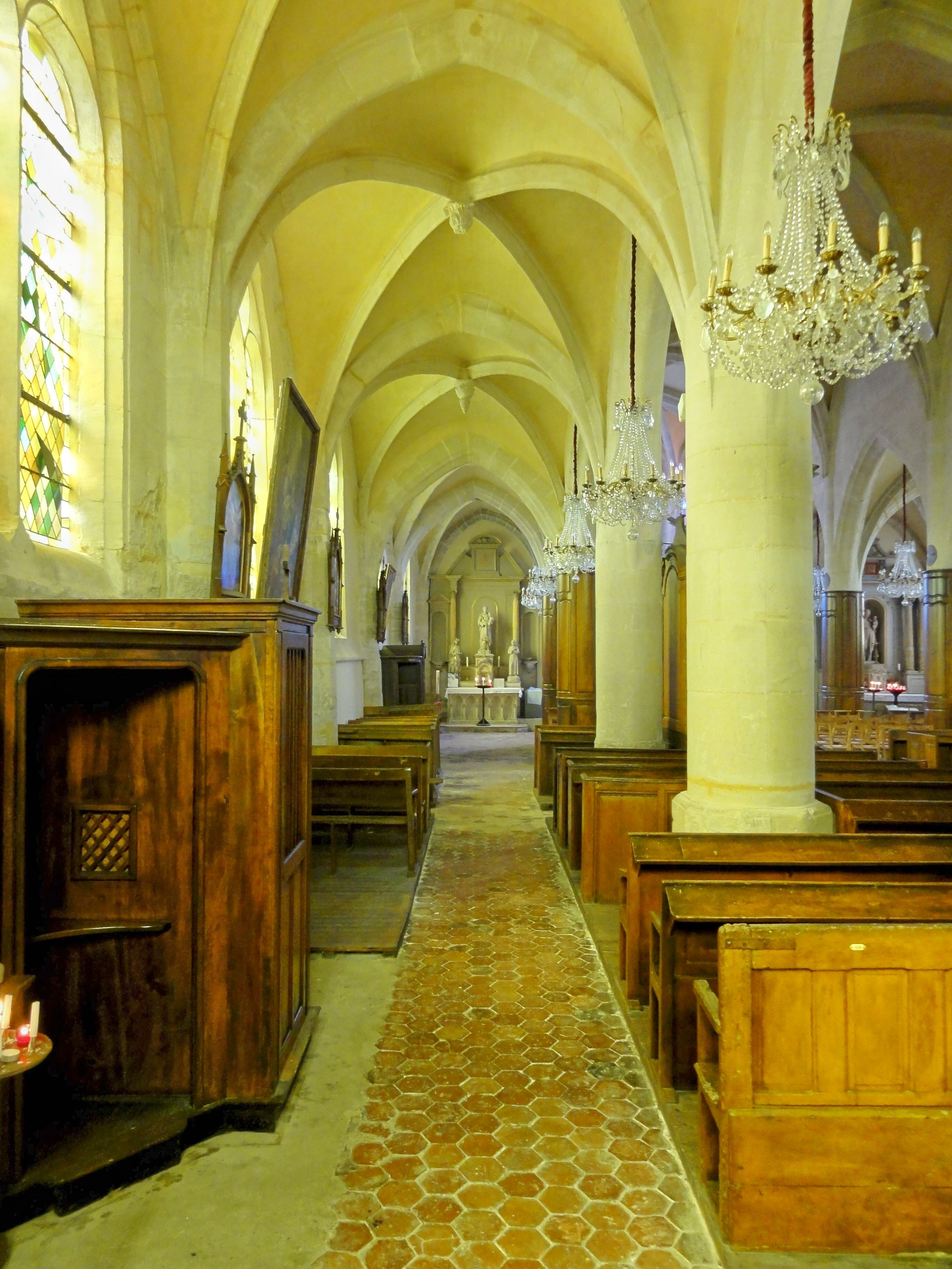 Bas-côté nord.